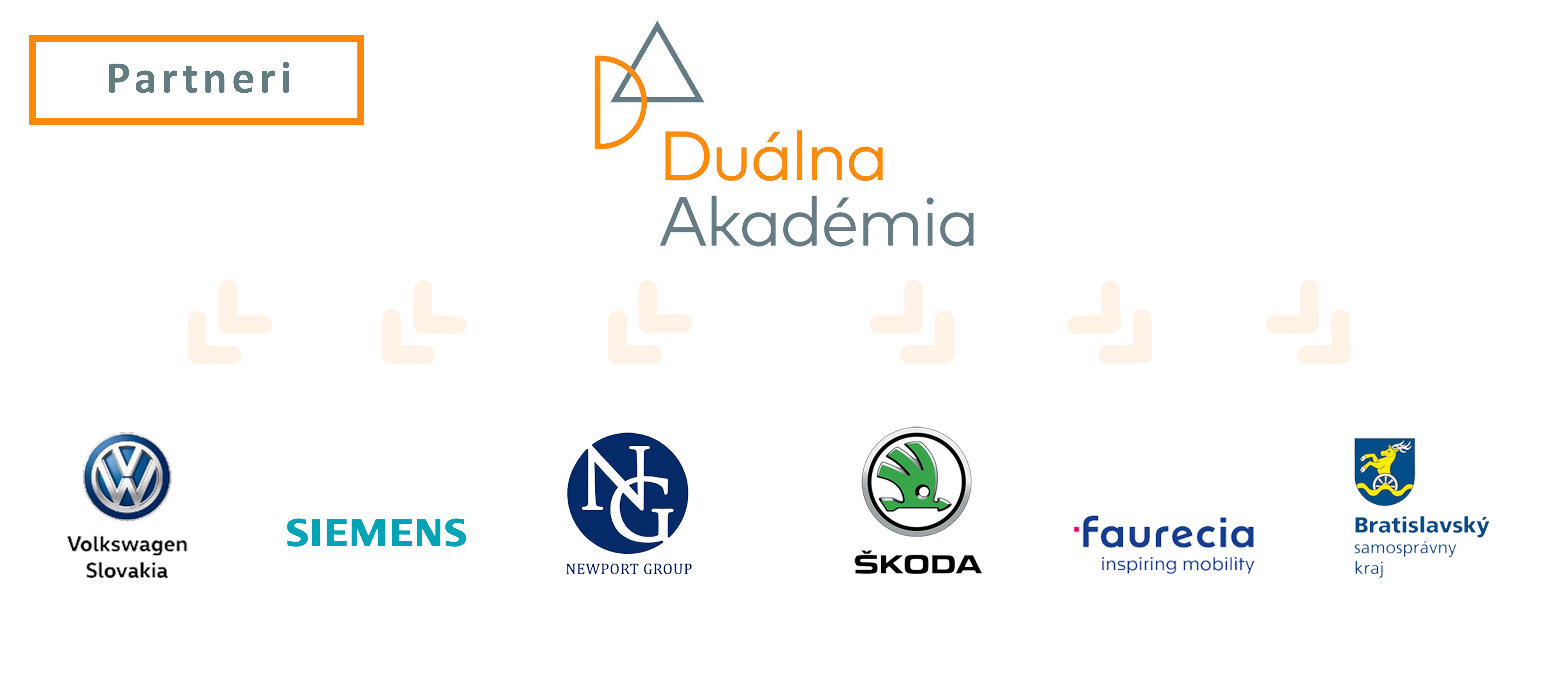 DA partneri